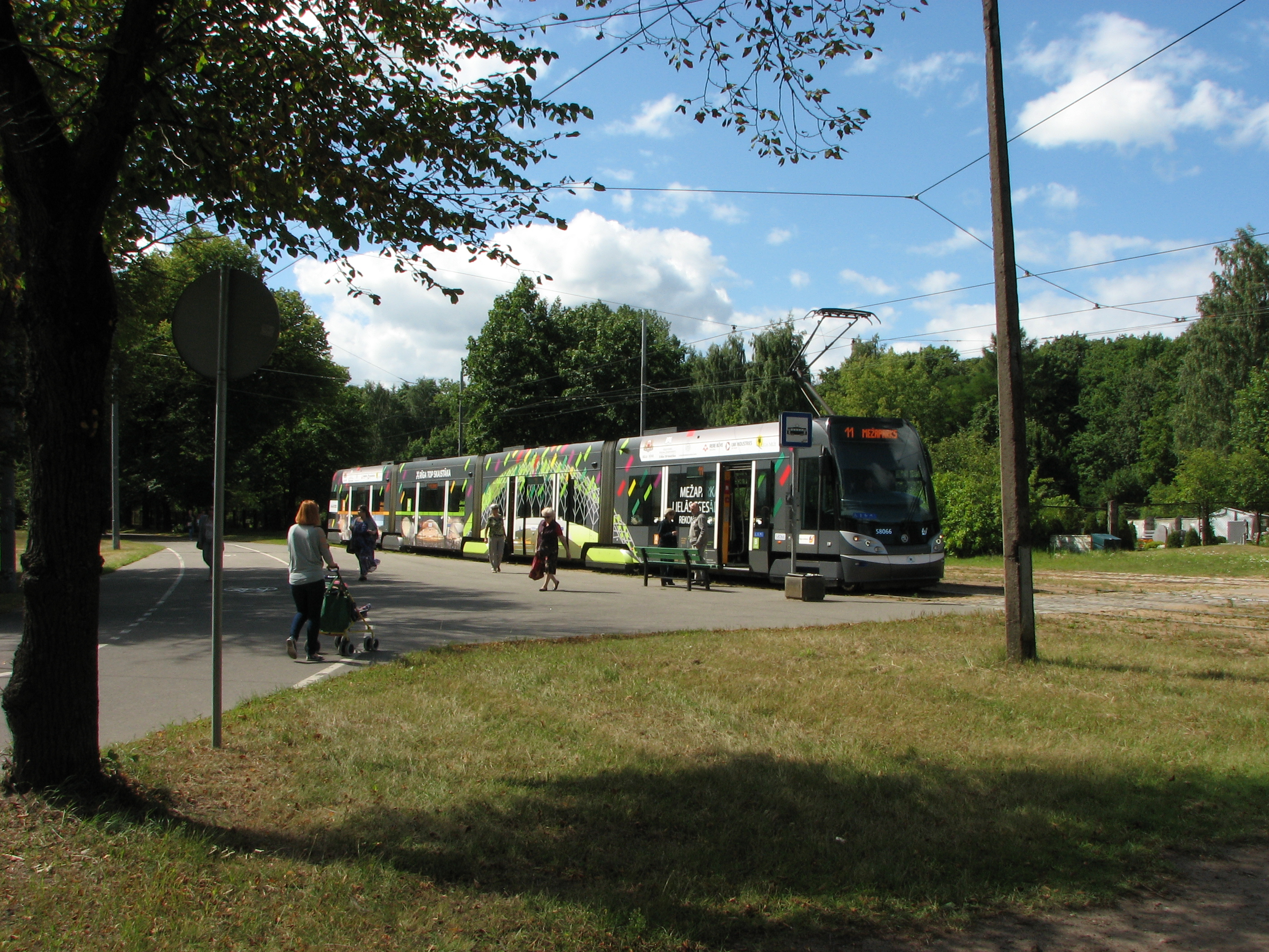 Škoda_15T1-58066_Riga_VIII.2017